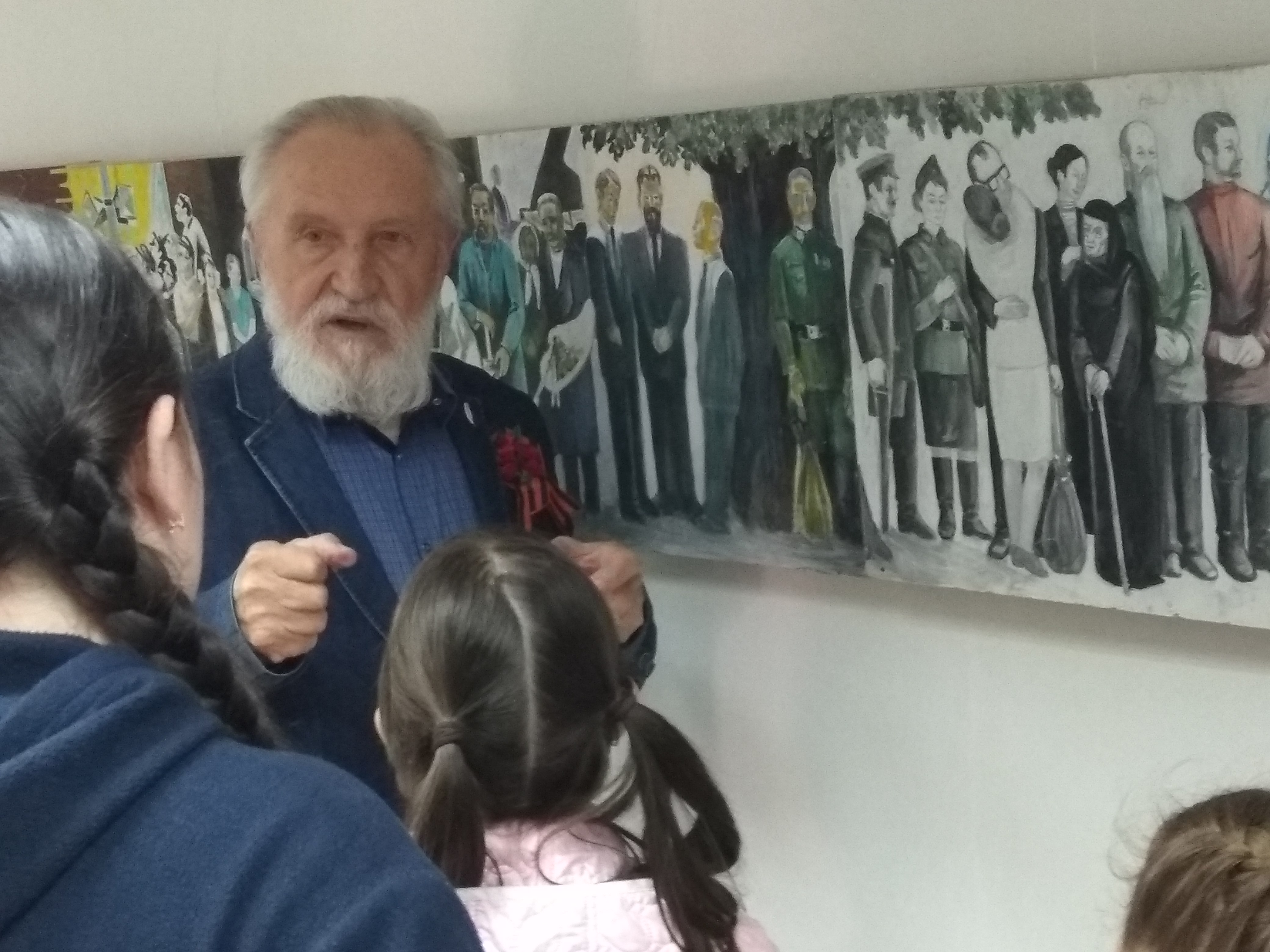 Художник Евгений Иннокентьевич Дацко на персональной выставке в ГВЗ Геленджика